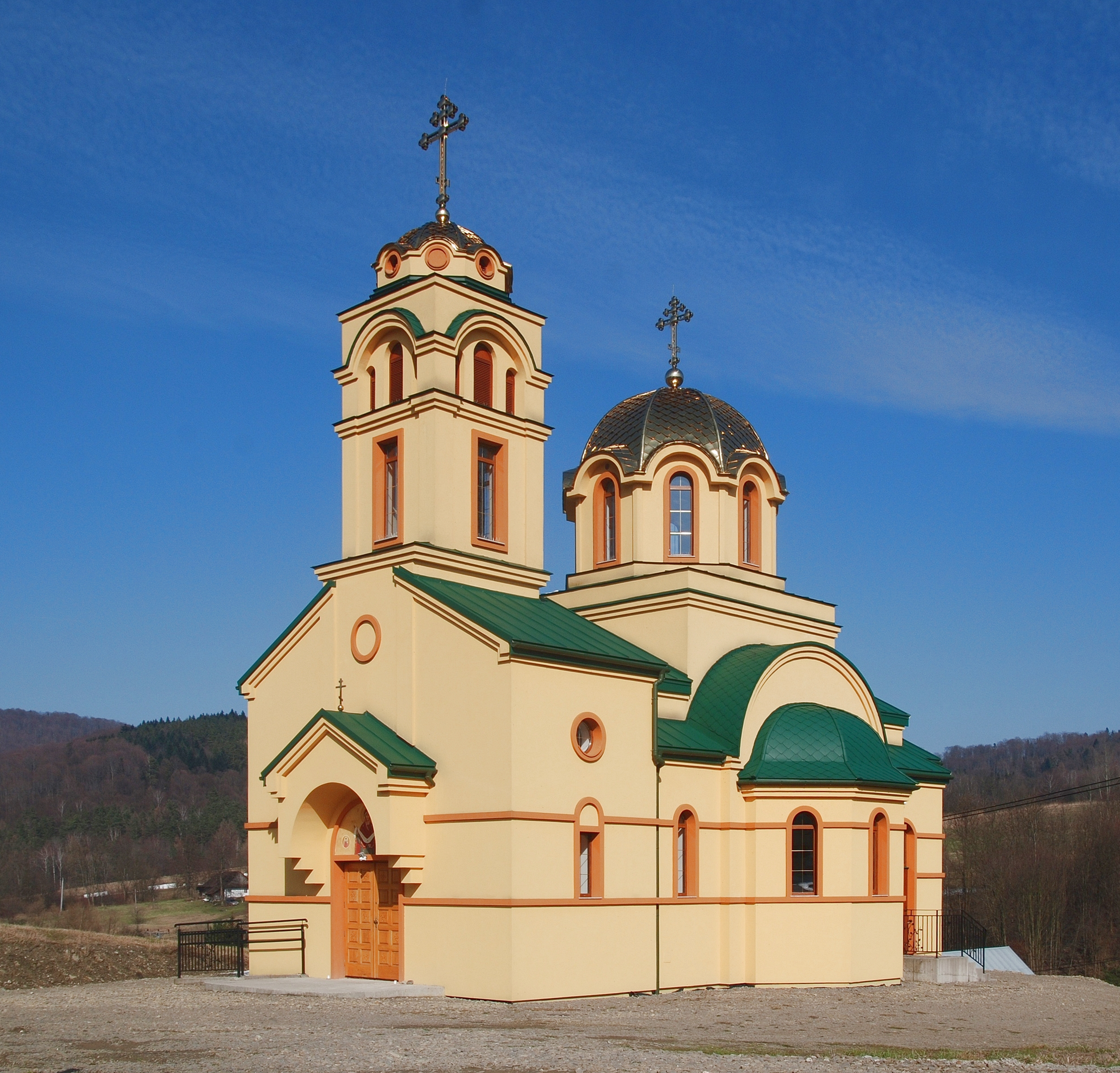 Cerkiew Opieki Matki Bożej i Poczajowskiej Ikony Matki Bożej w Bielance